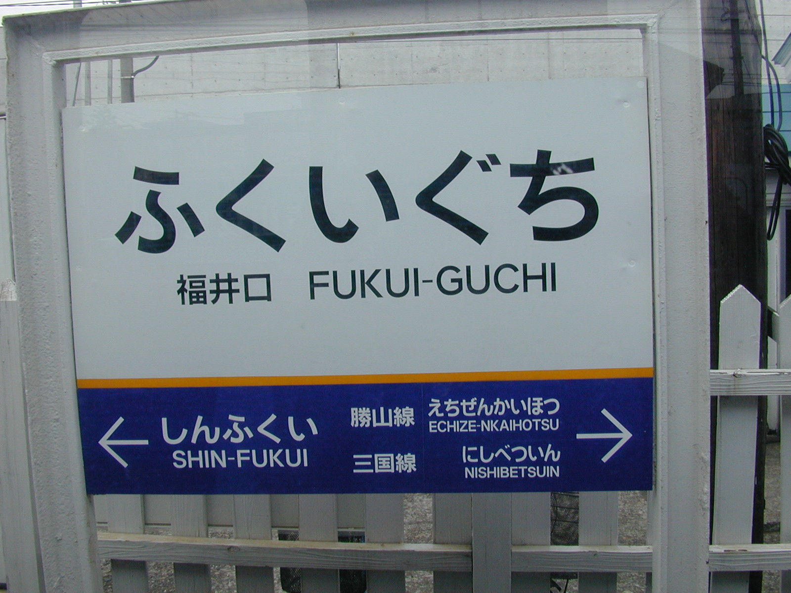 Fukui-guchi Station Nameplate